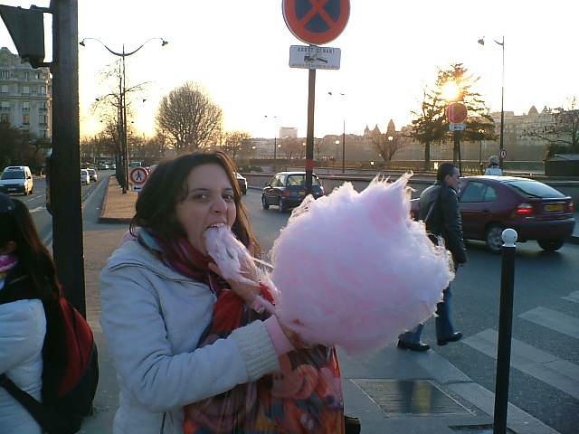 Λίγο μαλλί της γριάς για τα γενέθλια σου (εγώ θα προτιμούσα το κορίτσι)--*tony esopiλέγε 19:19, 1 Απριλίου 2008 (UTC).